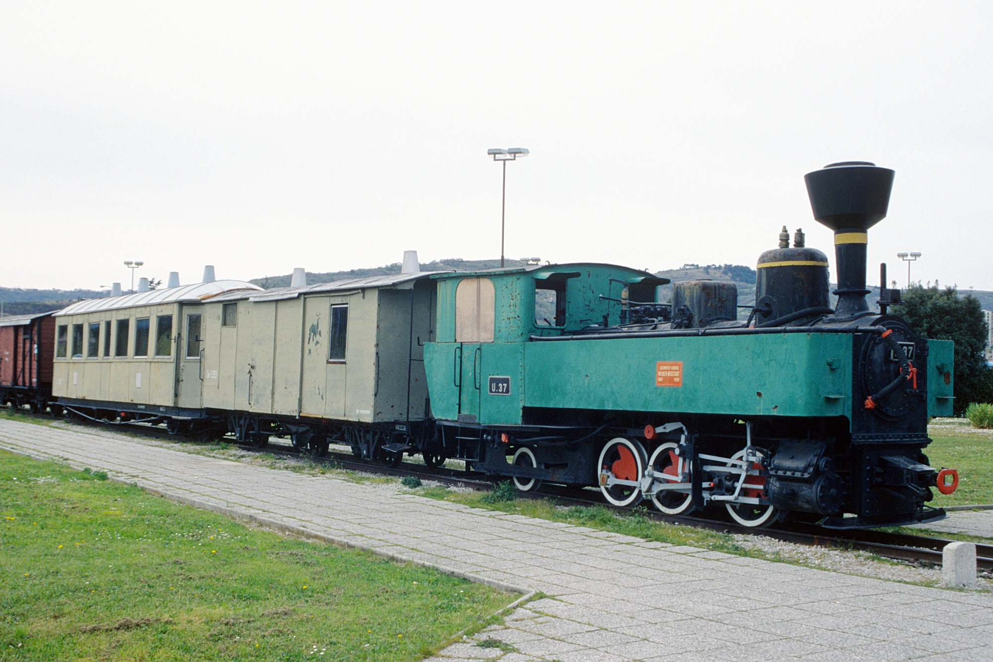 en: Old Austrian U-class narrow gauge engine U.37 of the Parenzana railway on plinth in Koper, Slowenia. The cars, that had no connection with the Parenzana were removed at a later date. de: Altösterreichische Schmalspurlokomotive der Reihe U, U.37 der Parenzana (Lokalbahn Triest - Parenzo) als Denkmal in Koper, Slowenien. Die Waggons, die nicht von der Parenzana stammten, wurden zu einem späteren Zeitpunkt entfernt.